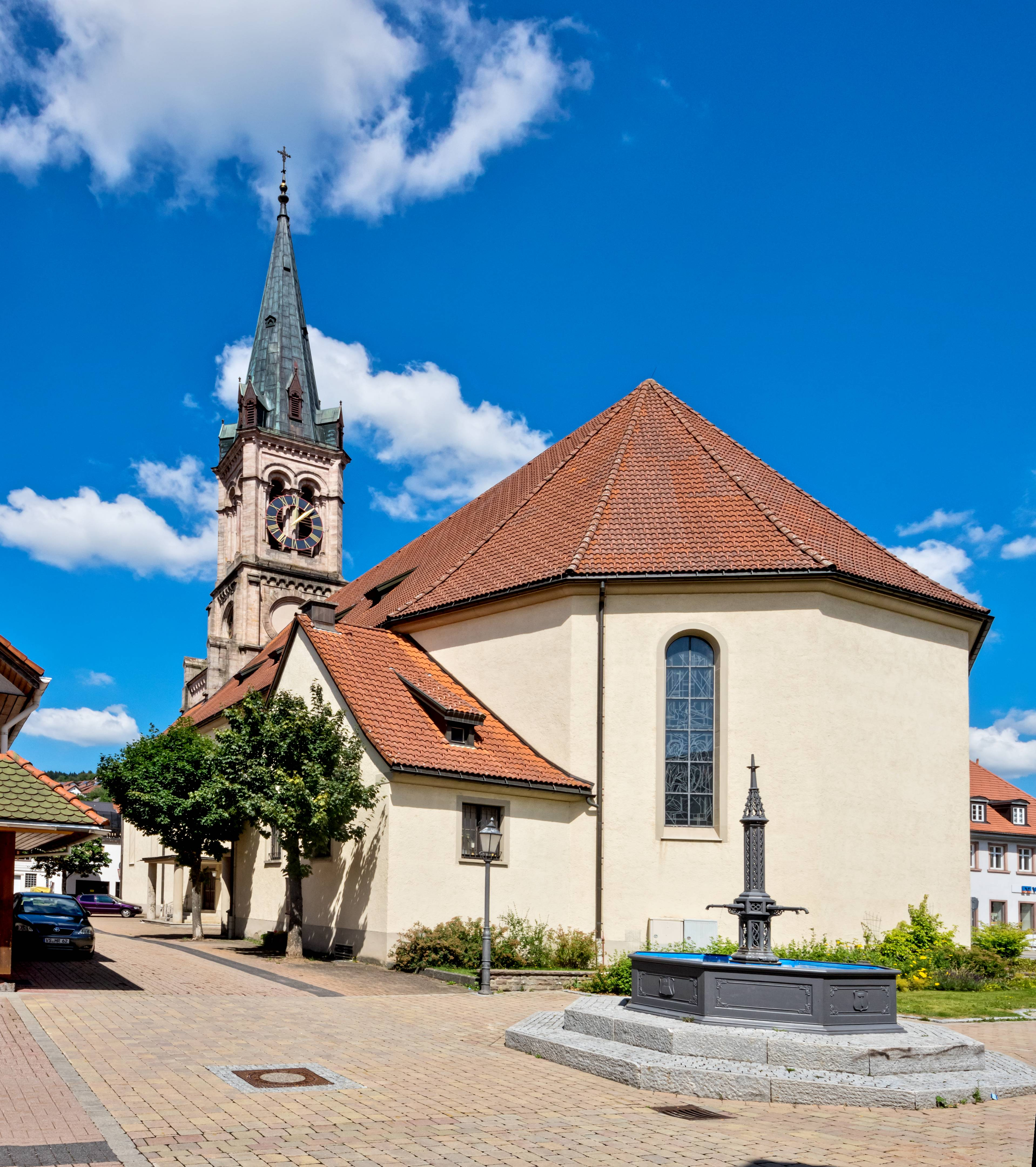 St. Martin in Vörenbach